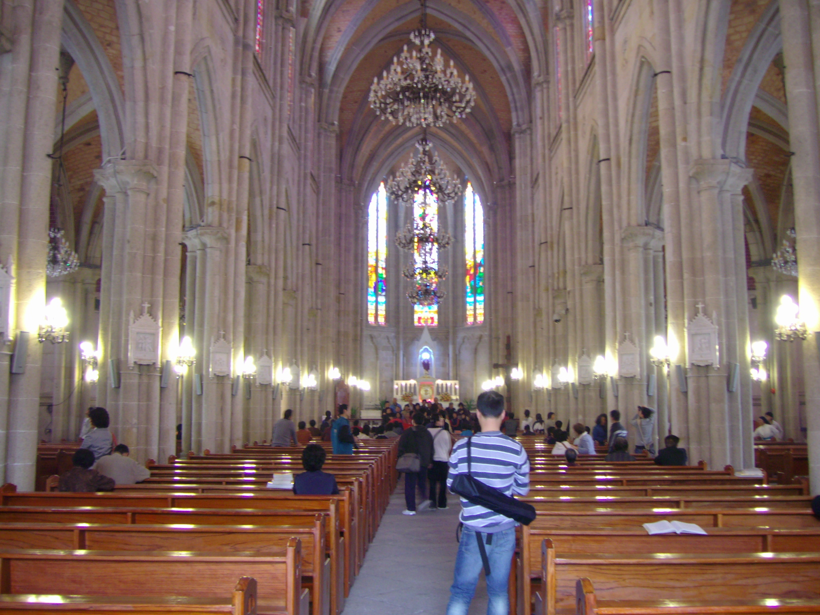 广州石室圣心堂